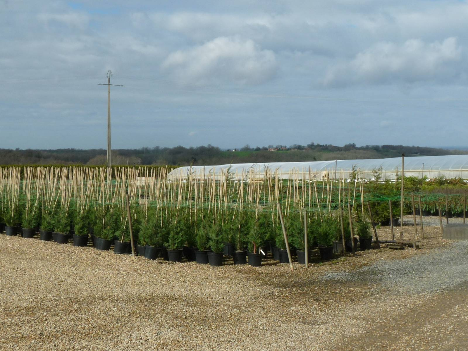 pépinières de Montemboeuf, Charente, France